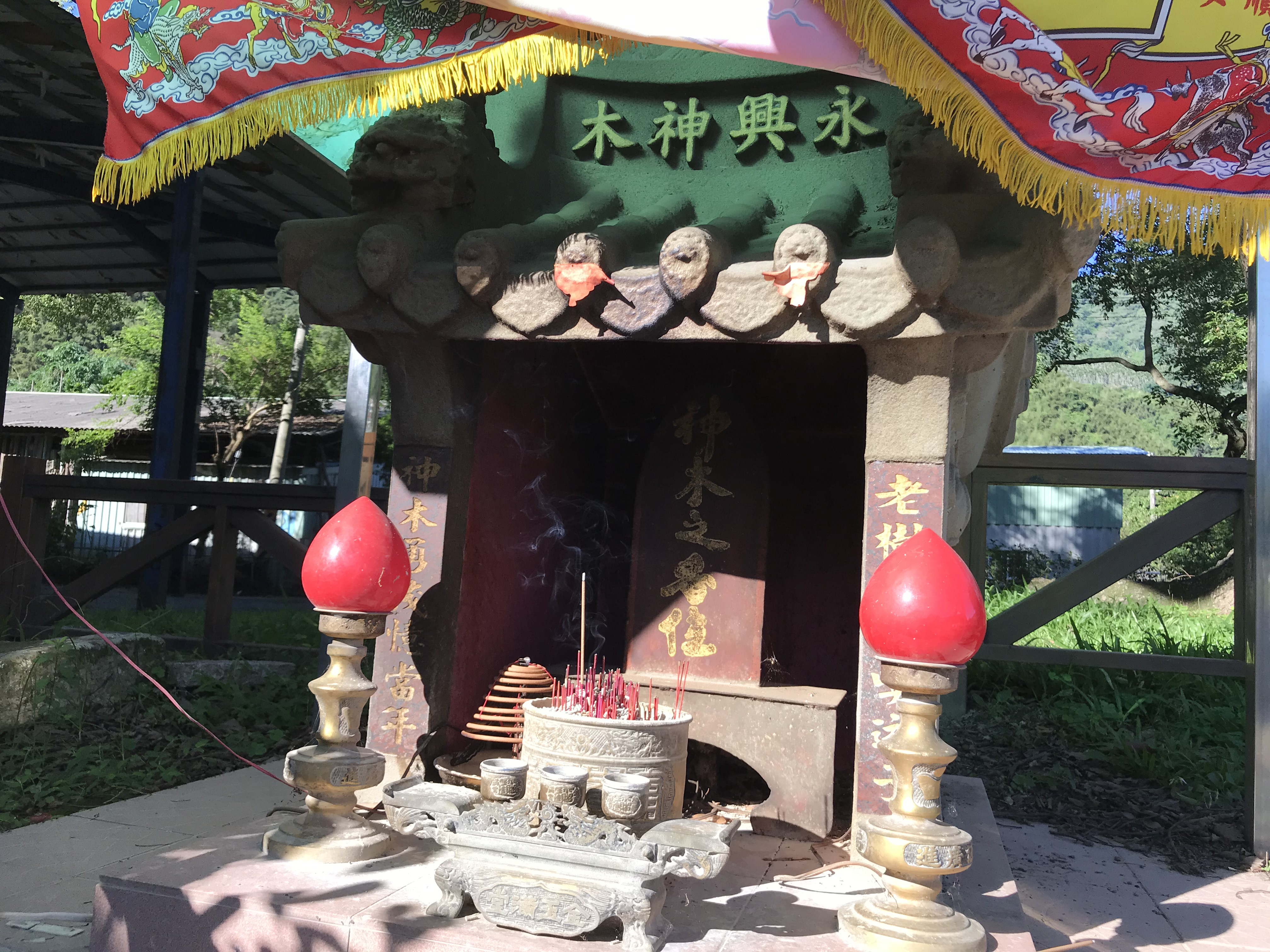 中文（台灣）: 永興神木牌位